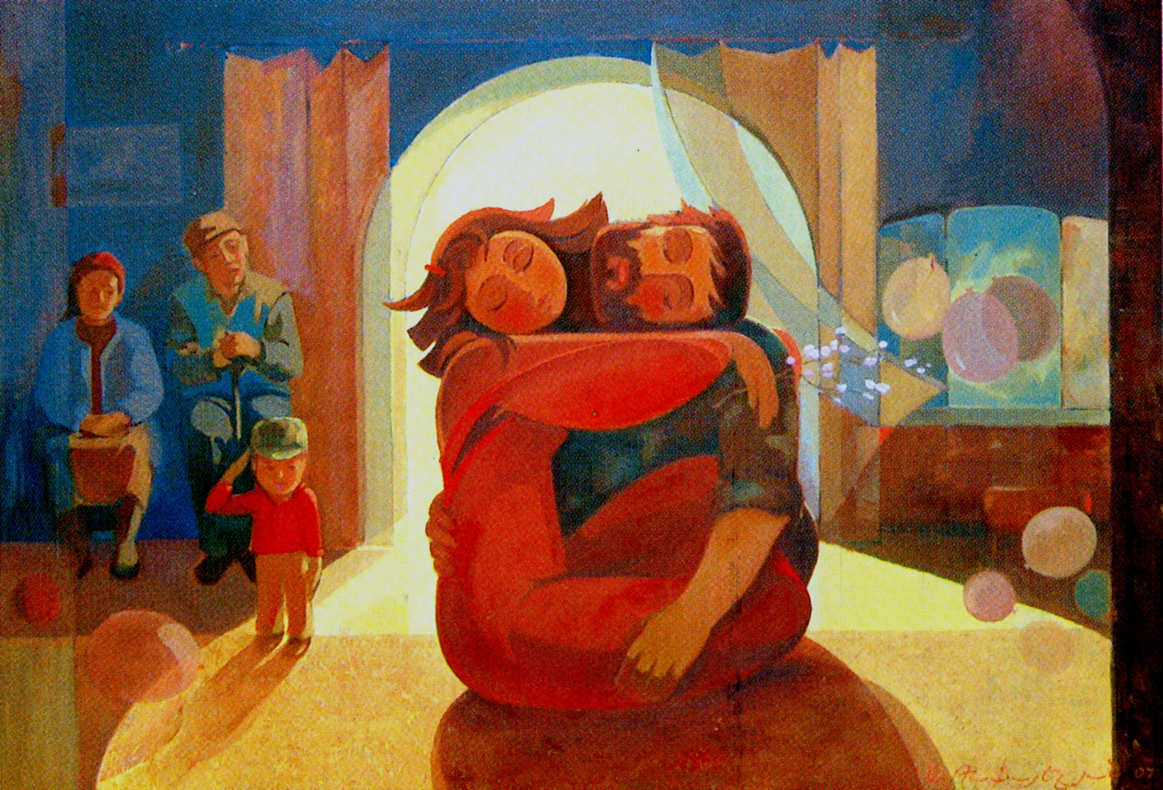 Հաղթանակի օր. վերադարձ